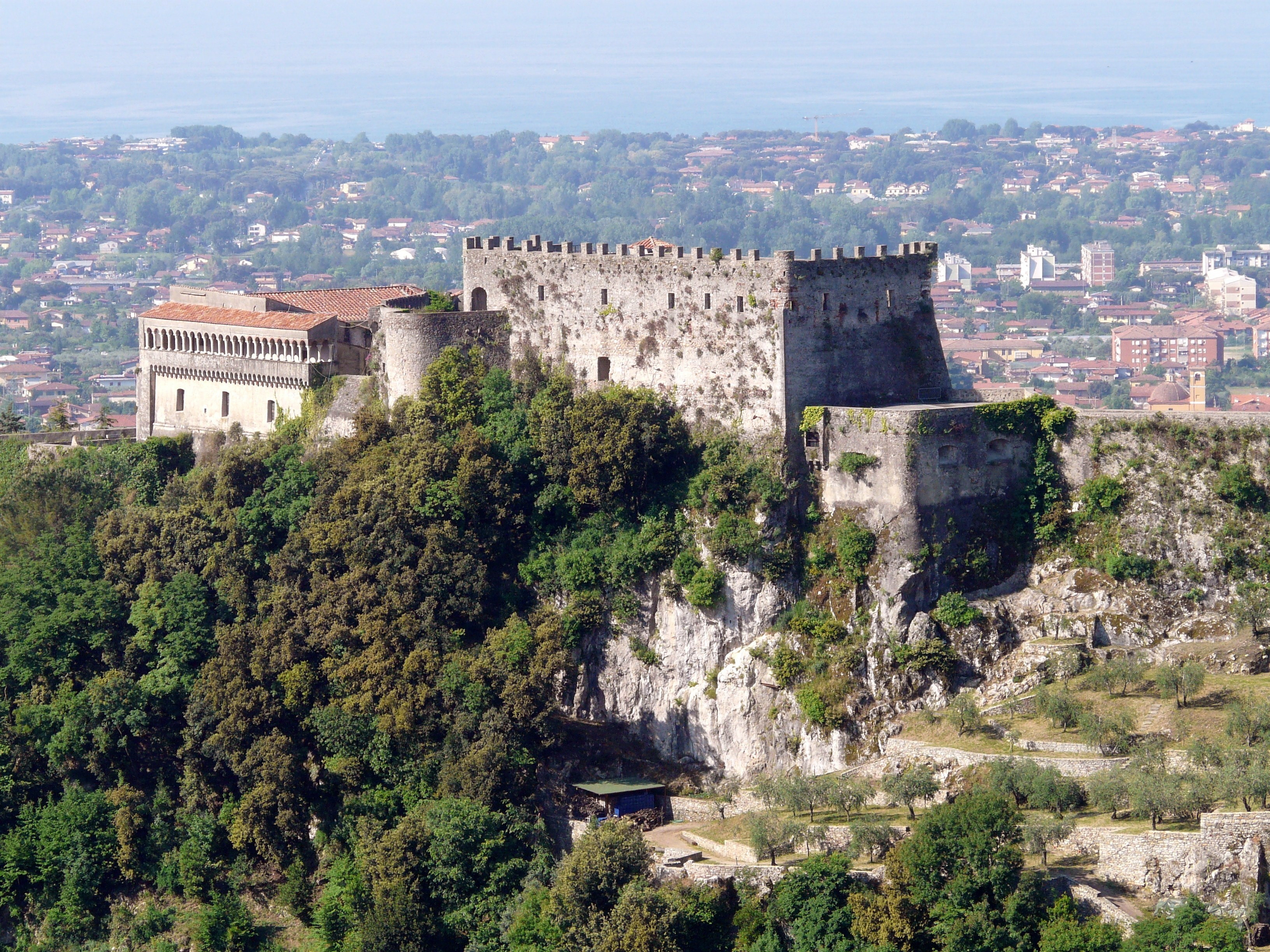 Panorama della Rocca Malaspina di Massa, Toscana, Italia